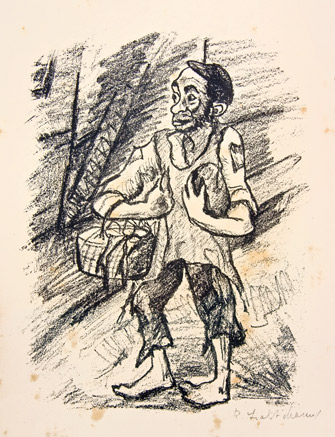 Rachel Szalit-Marcus zu Mendele Moicher Sforim: „Fischke der Krumme“. Mappe mit 16 Lithographien auf Bütten und einer Einleitung von Julius Elias. Berlin : Propyläen, 1920 oder 1921 Blatt 4. Fischke, der Krumme, wird vorgestellt. 53,2 cm x 35,7 cm